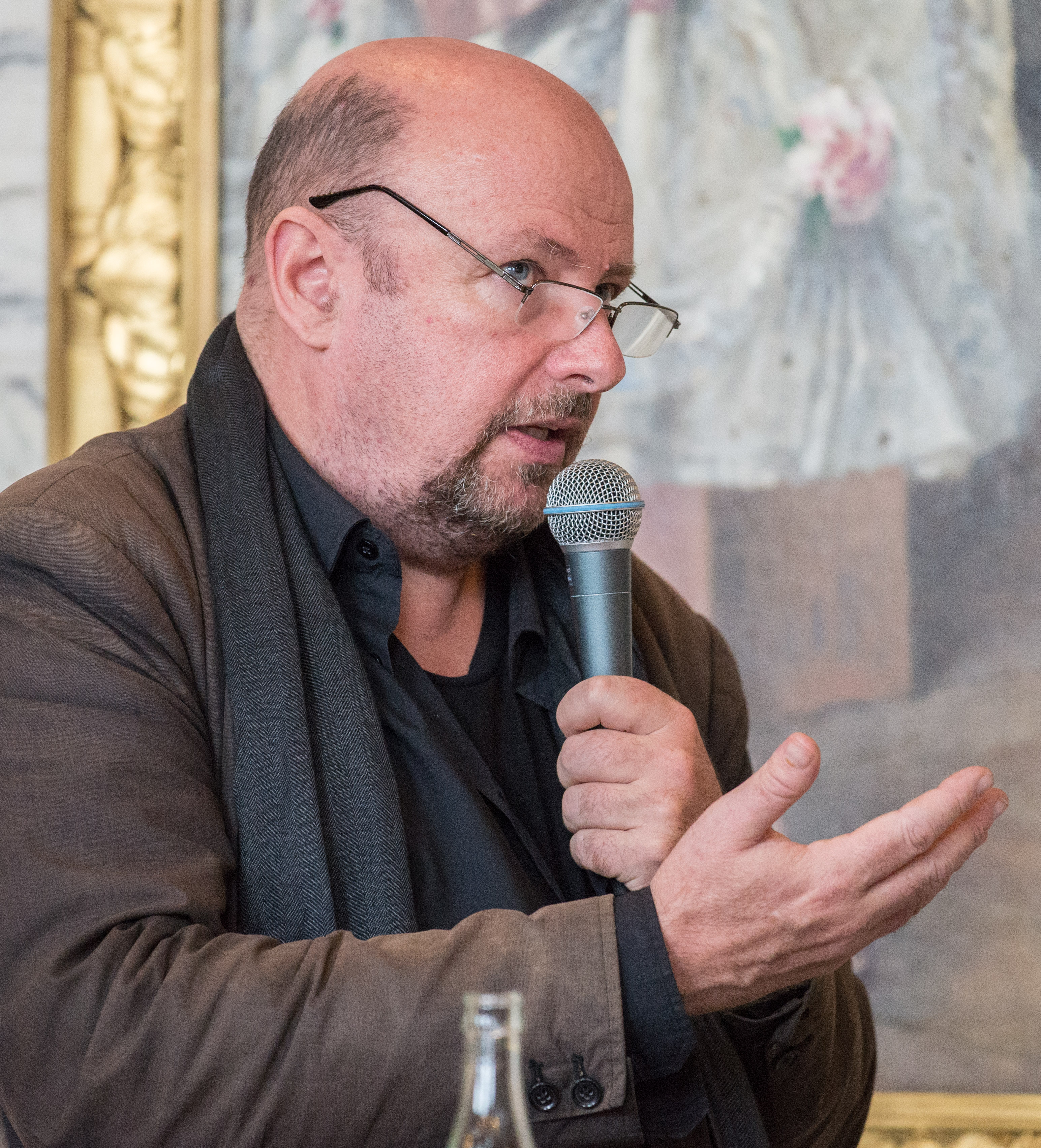 Magnus Lindman under Öppet Hus på Dramaten den 19 september 2015.